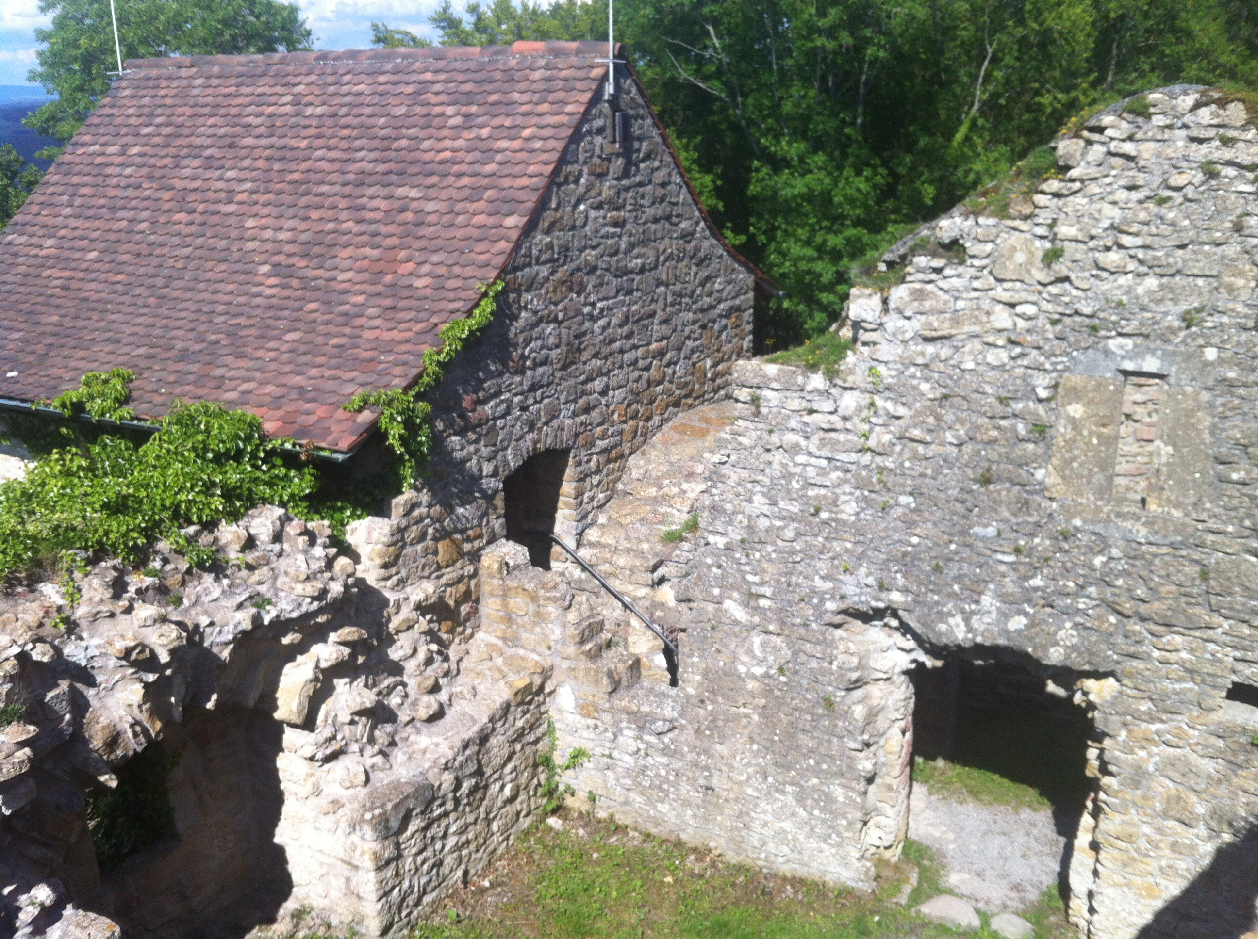 Küssaberg, Gemeinde im Landkreis Waldshut in Baden-Württemberg. Küssaburg, Torhaus und ehemalige Küche (Vordergrund).